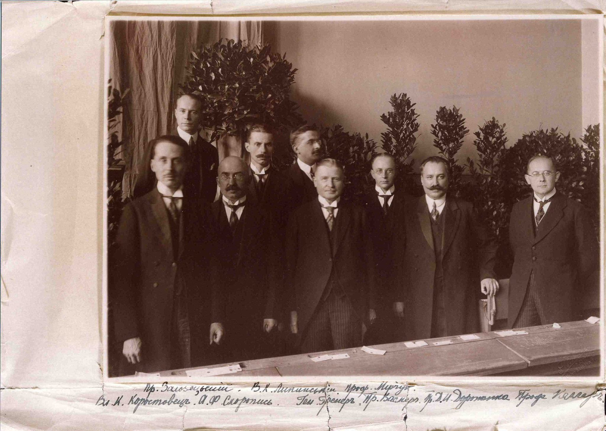 Український науковий інститут в Берліні. На фотографії члени засновники і професори Українського наукового інститут в Берліні. 1-й ряд (зліва направо): В. Коростовець, О. Скоропис-Йолтуховський, ген. Ґренер, Васмерг, Д. Дорошенко, Келлєр; 2-й ряд: В. Залозецький-Сас, В. Липинський, І Мірчук, 1927 рік.